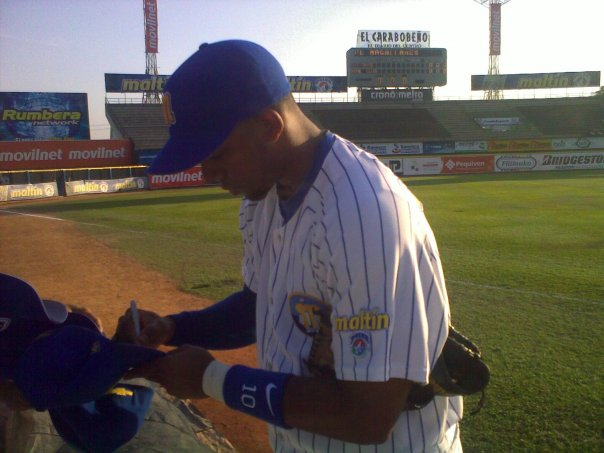 Elvis Andrus firmando autografos